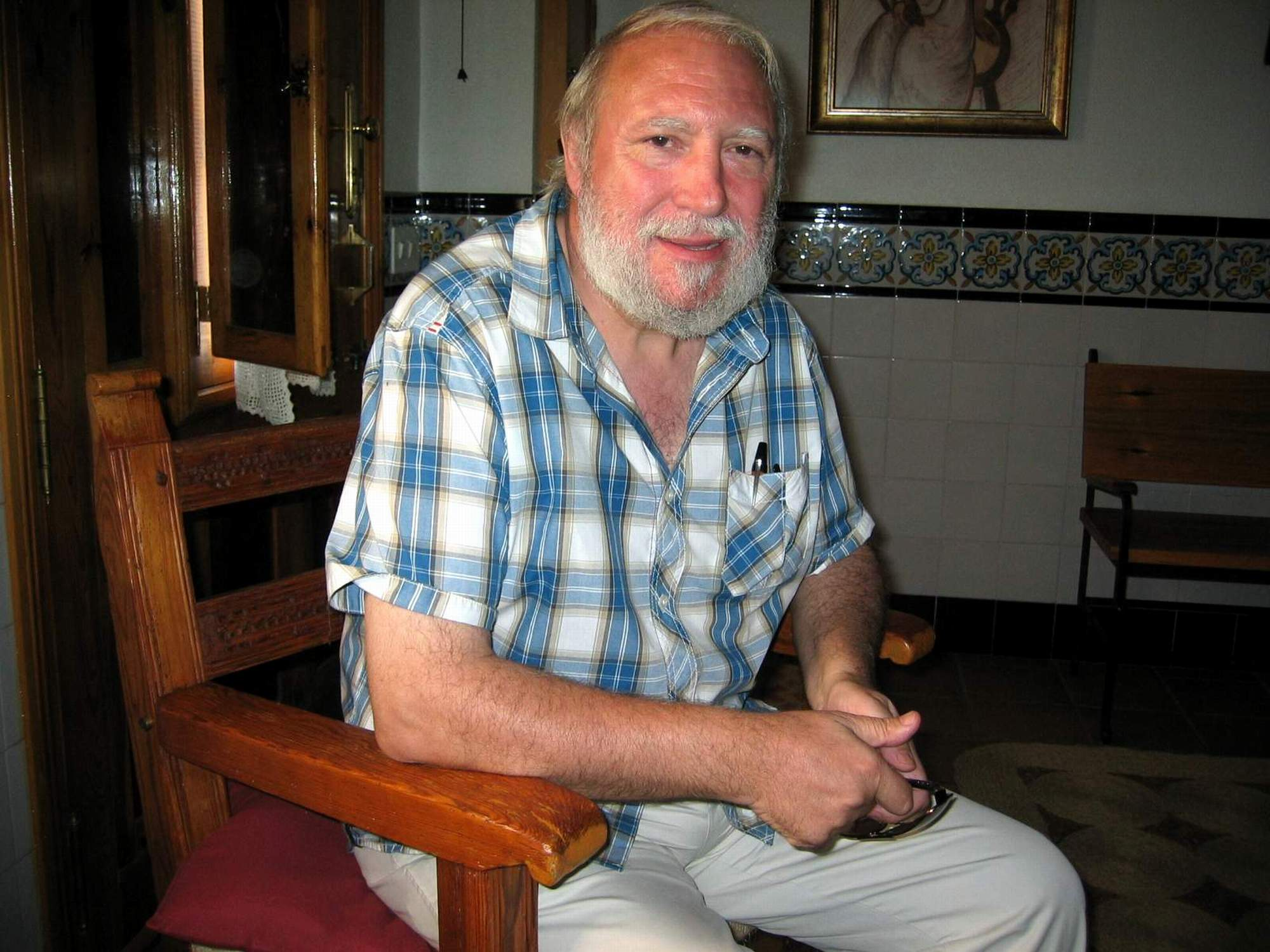 El escultor Lucas Karrvaz durante una entrevista en Torrebaja (Valencia), 2012.